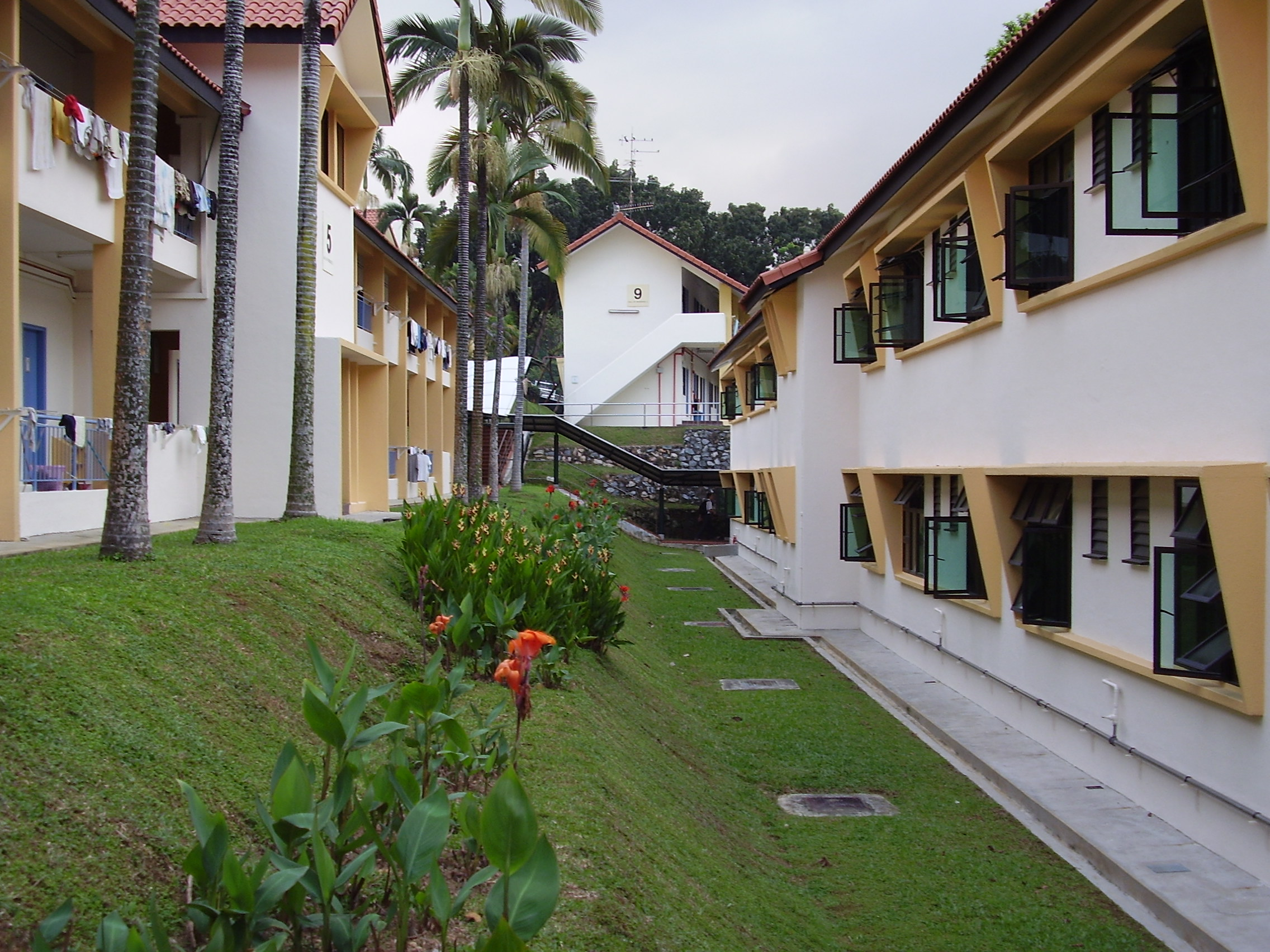 NTU Hall 2